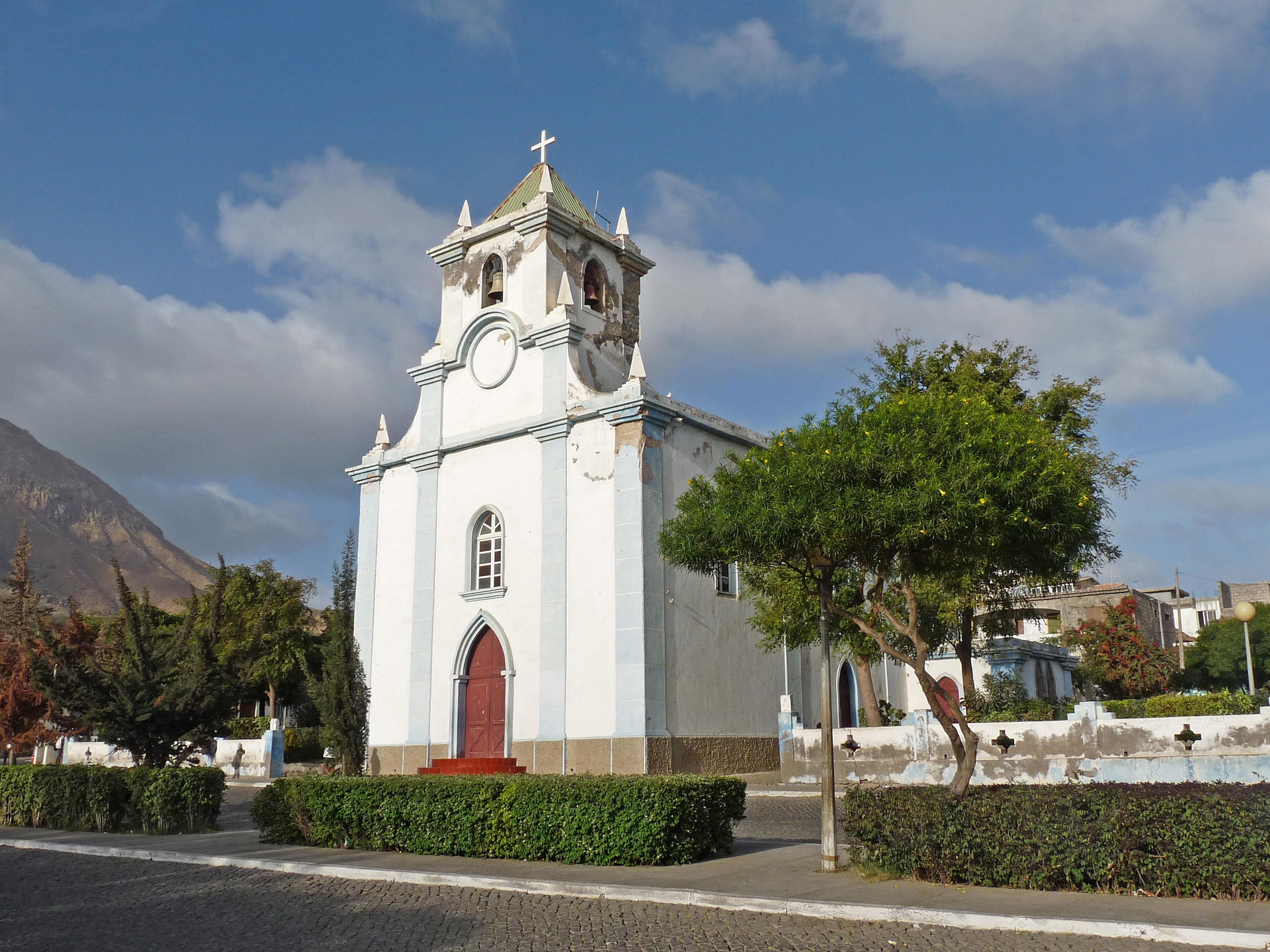 Eglise de Tarrafal (île de Santiago, Cap-Vert)